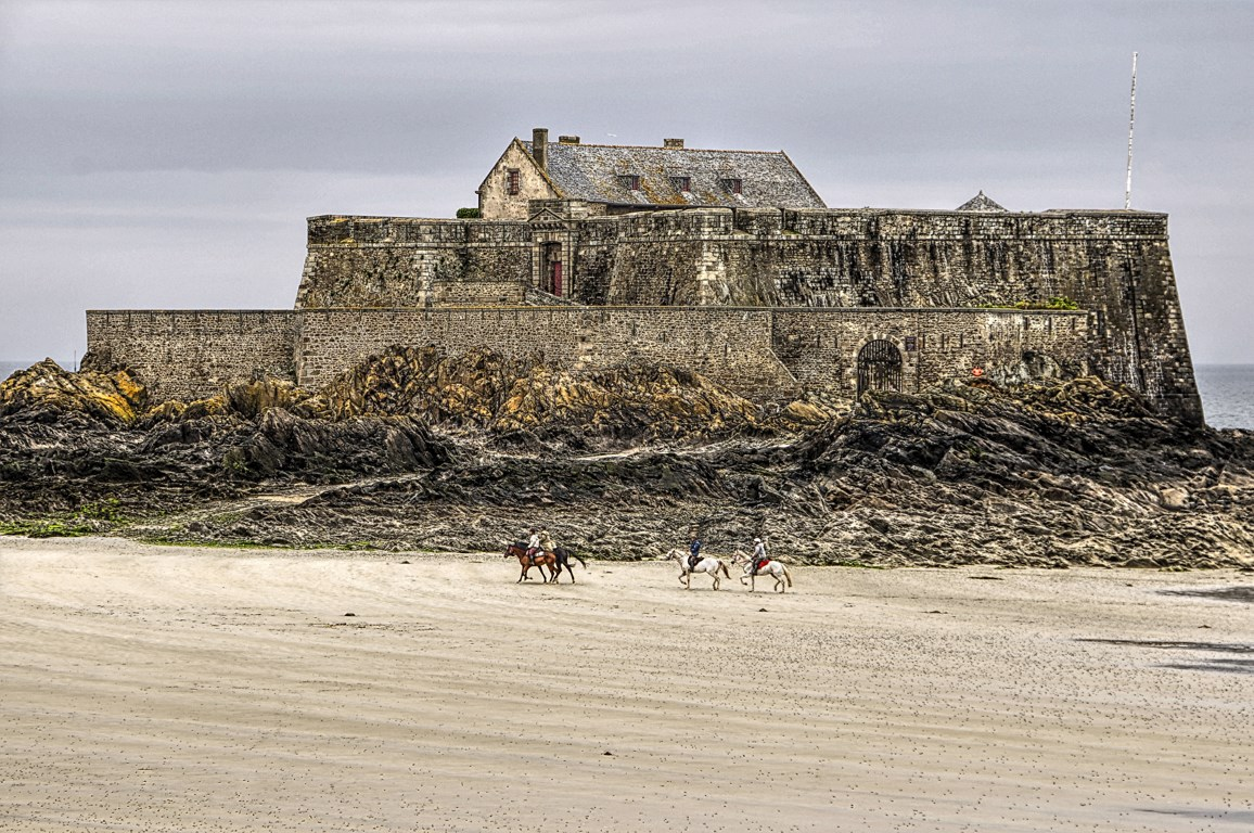 Fort National de Saint-Malo (Ille-et-Vilaine, Bretagne, France).